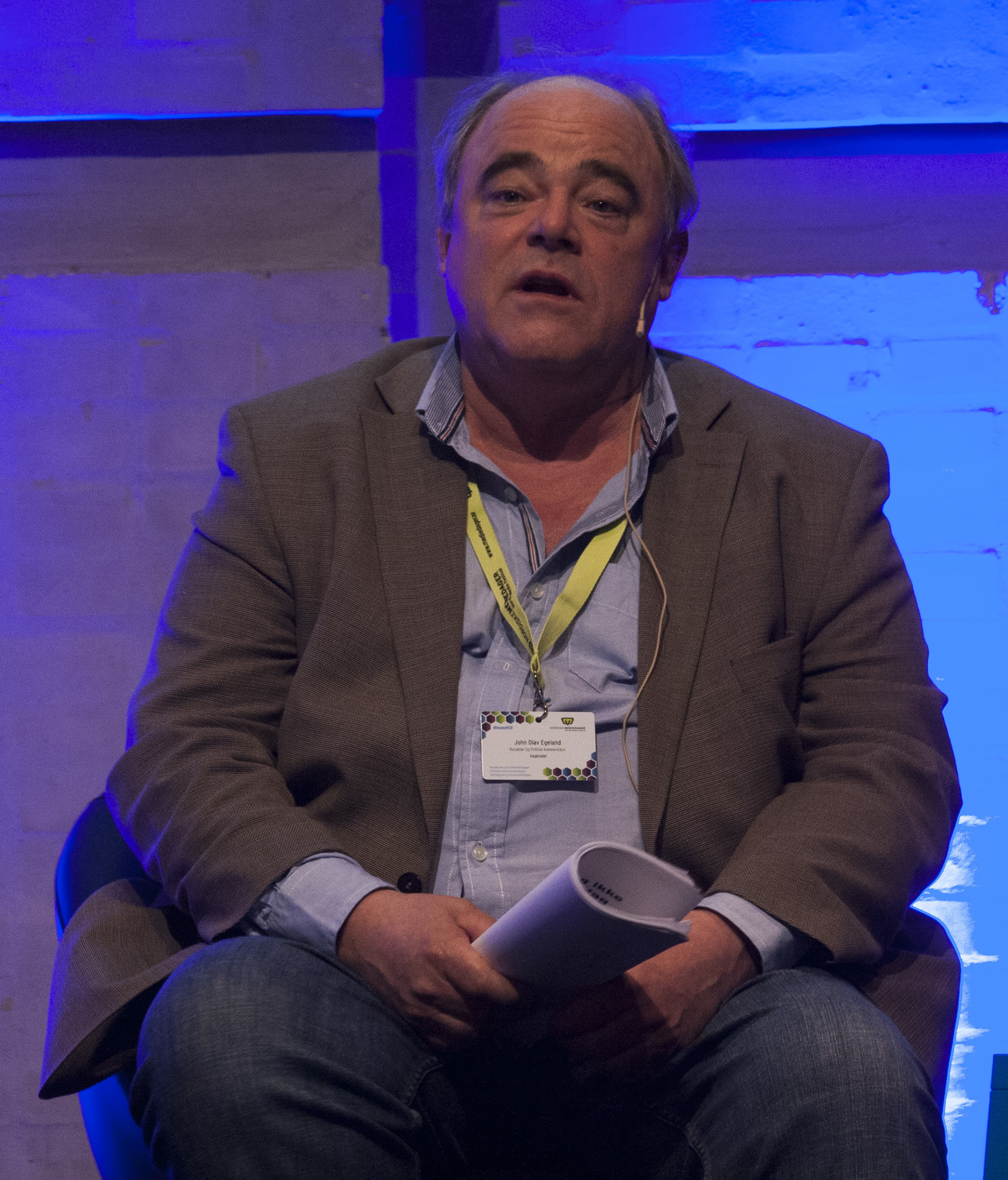 Nordiske Mediedager 2013